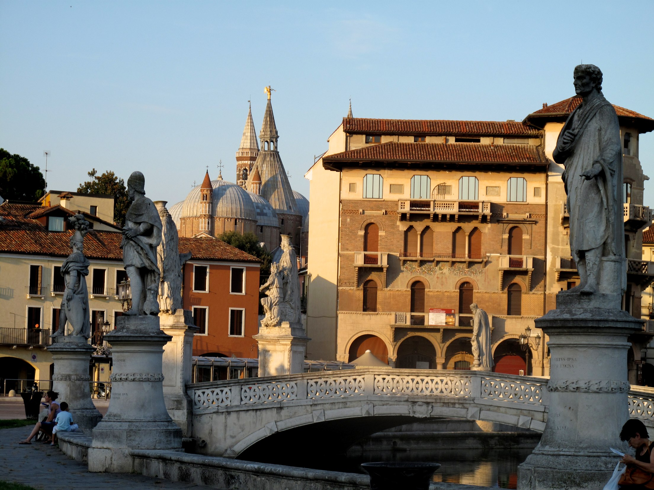 Padova juil 09 168